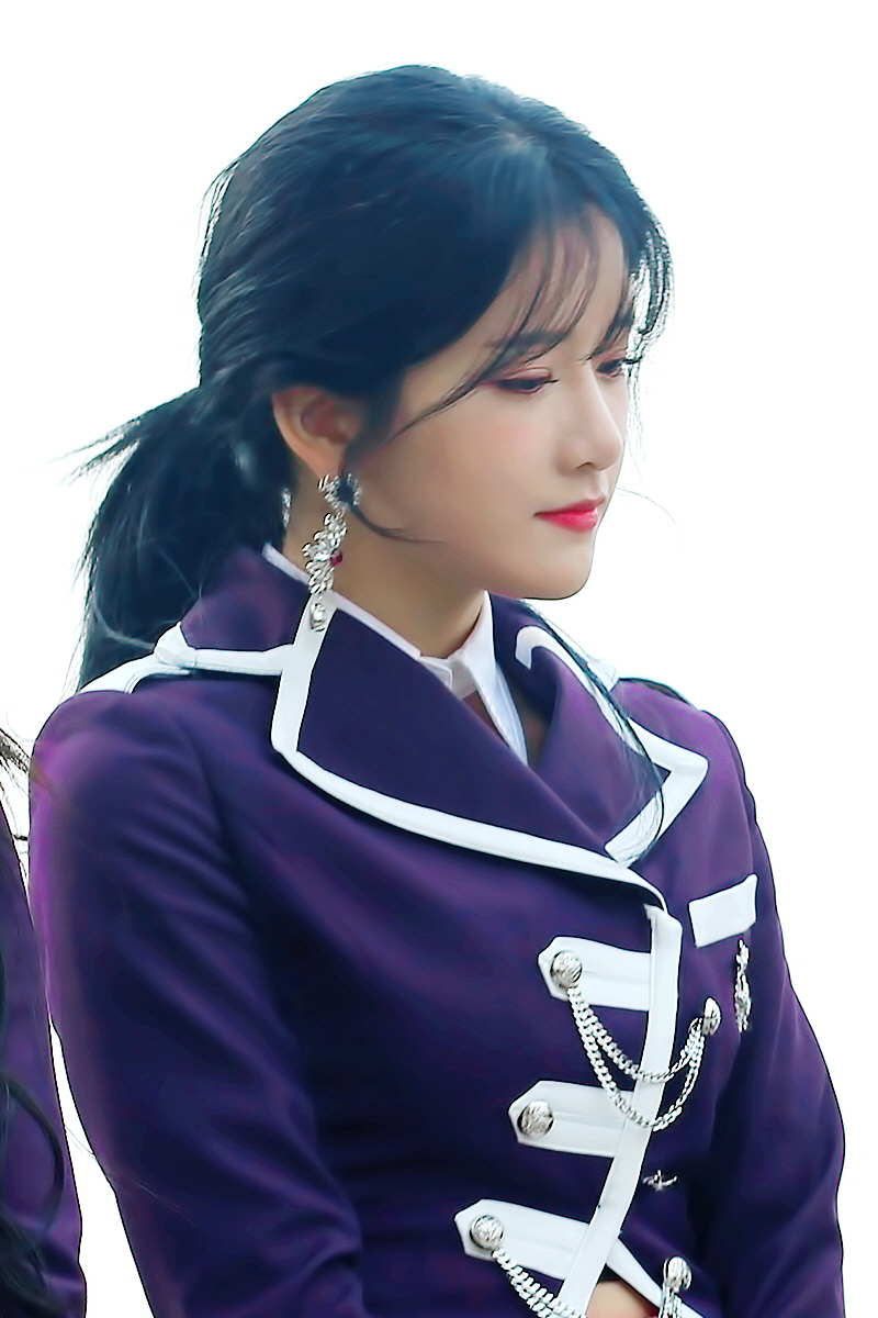 180317 우주소녀 미니팬미팅 직찍